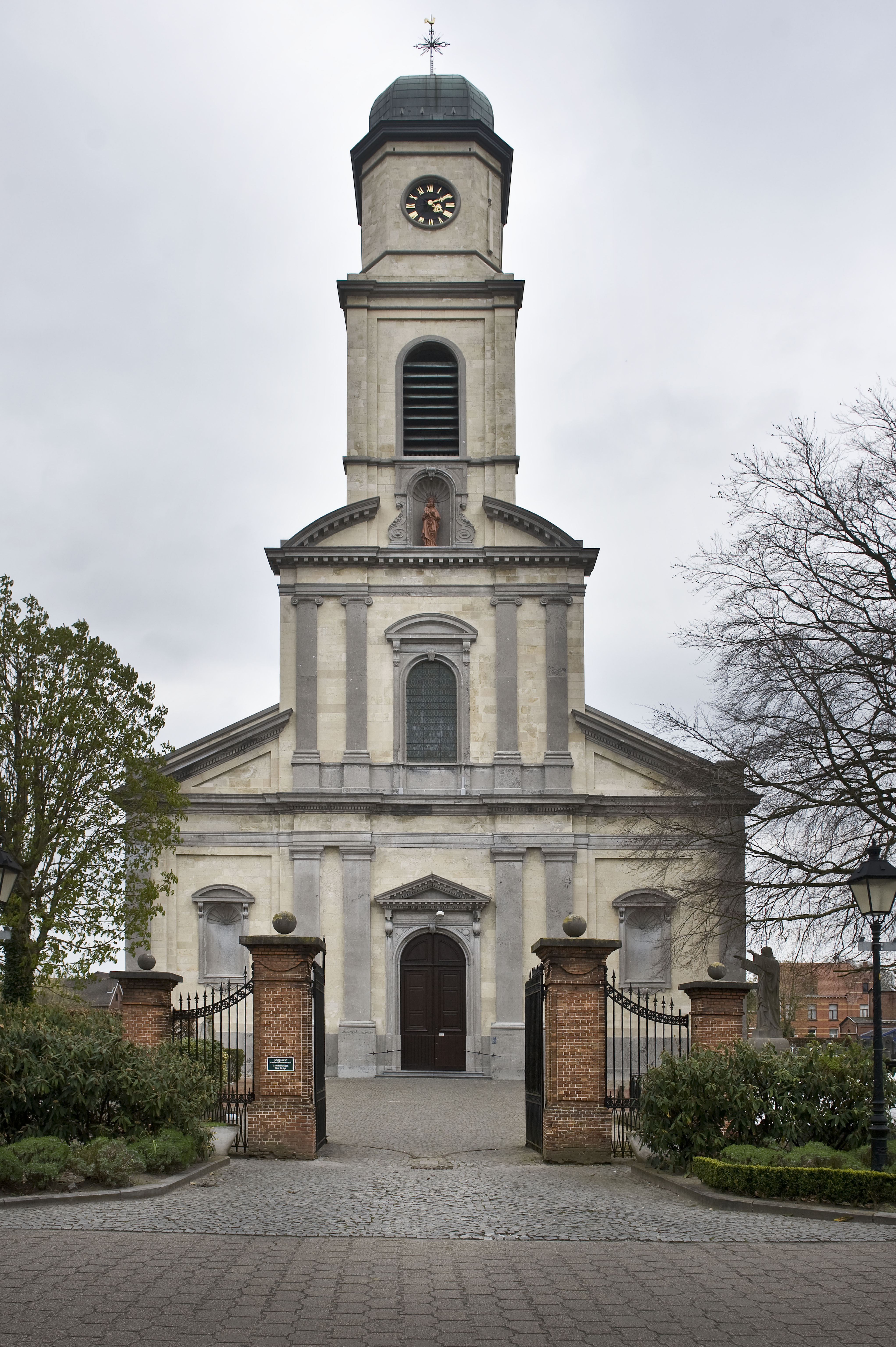 Nazareth (België) - Parochiekerk Onze-Lieve-Vrouw en Sint-Antonius Abt